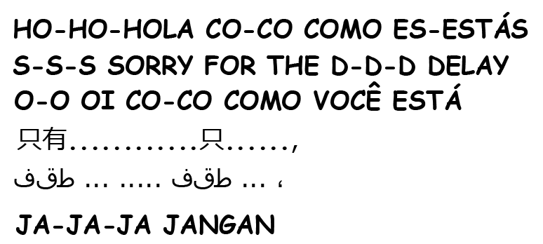 Representación escrita de la tartamudez